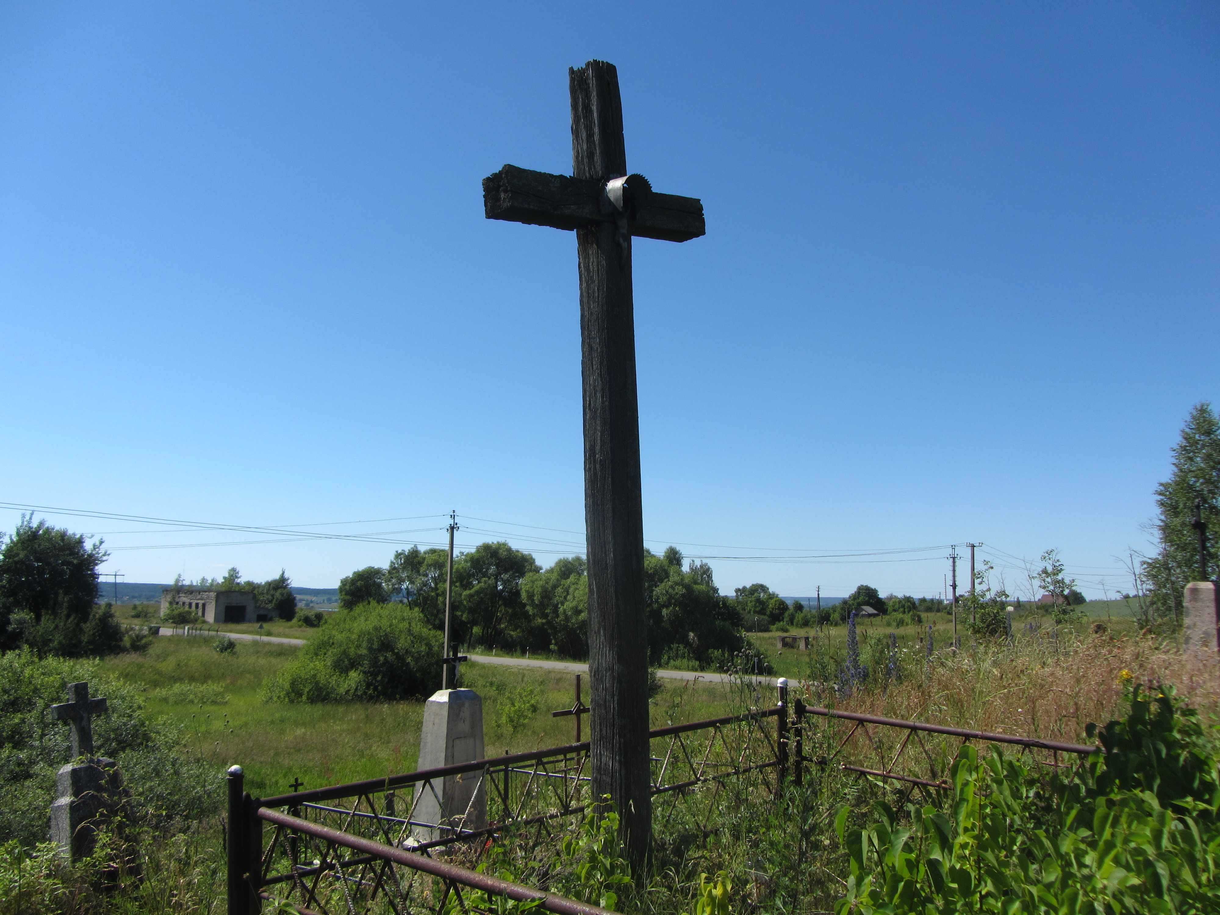 Pastrėvio sen., Lithuania